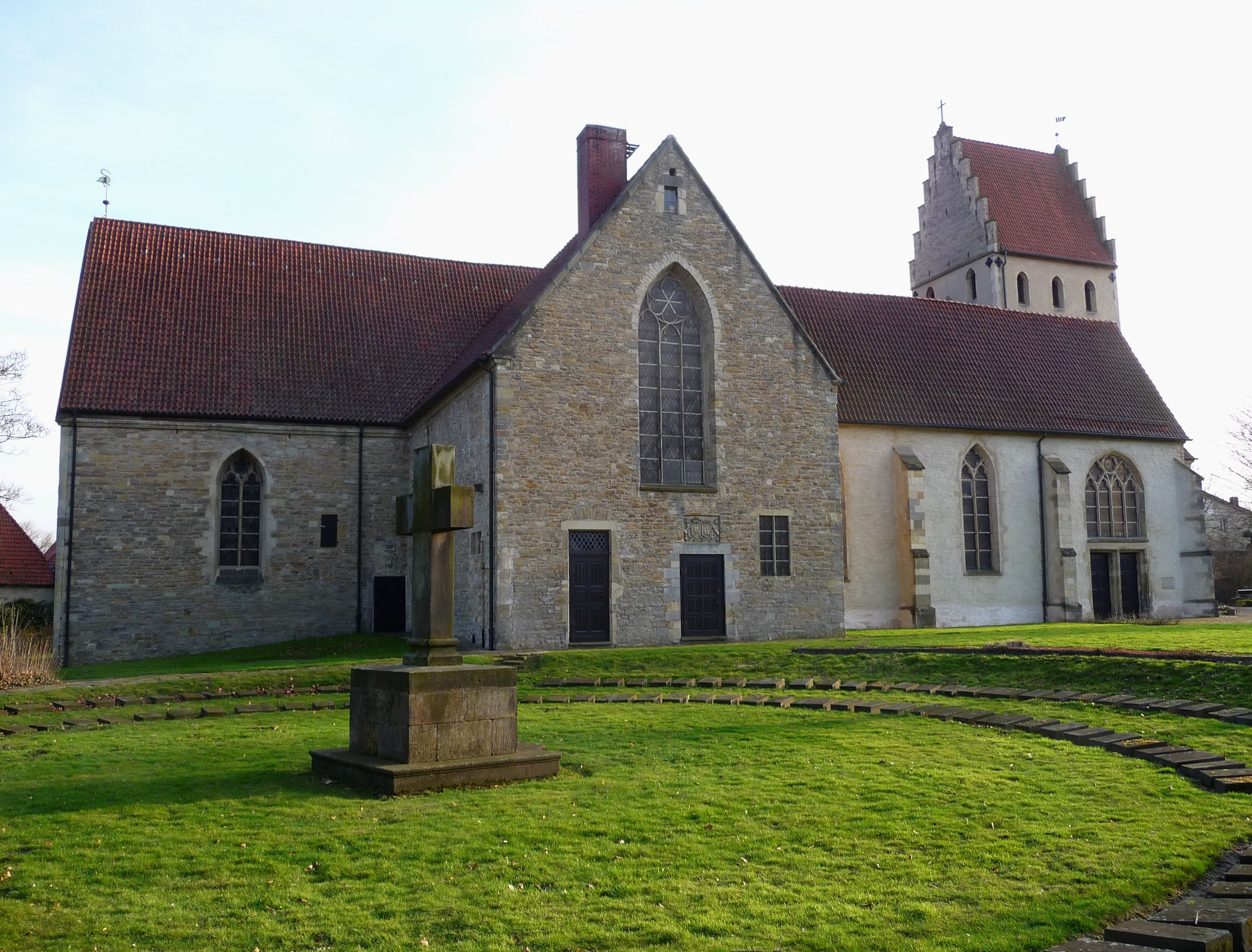 Die Große Kirche / 48565 Steinfurt-Burgsteinfurt (evangelisch) This image shows a heritage building in Germany, located in the North Rhine-Westphalian city Steinfurt (no. 7).